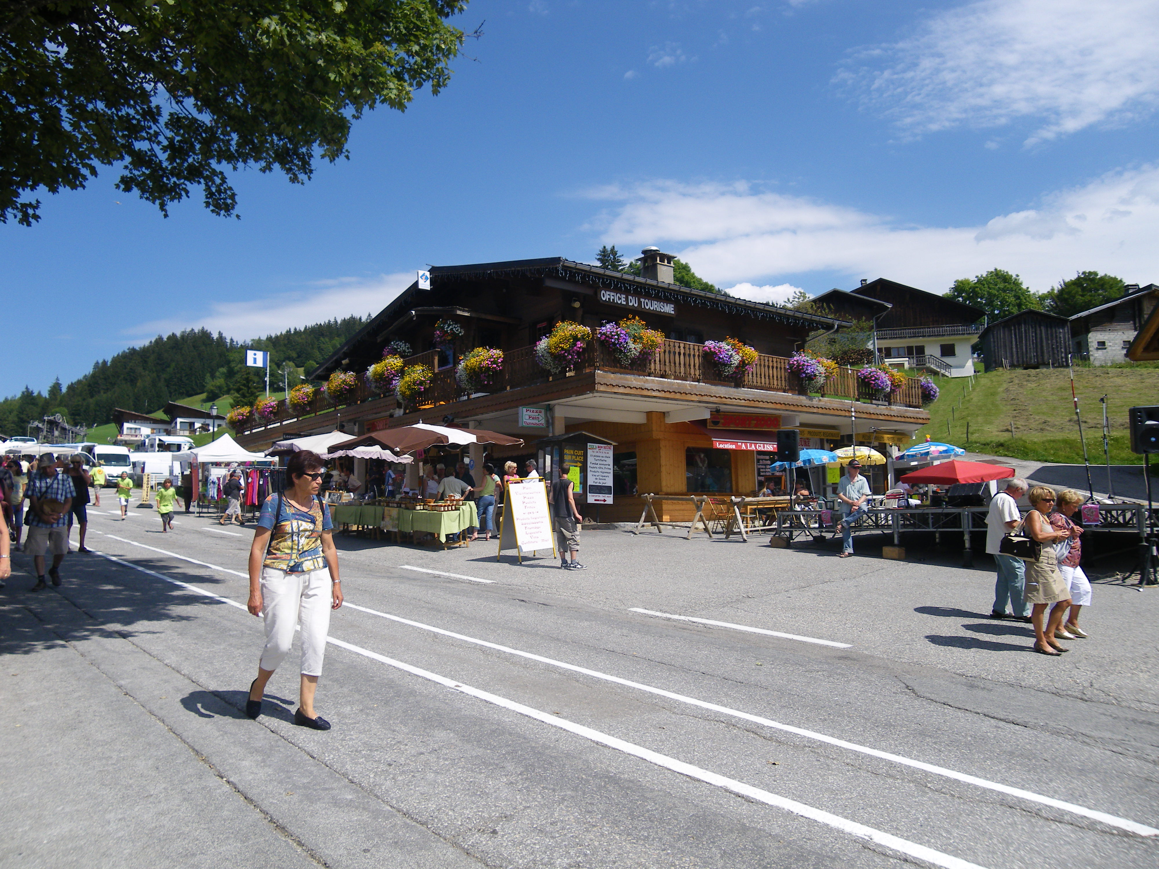 l'office de tourisme de notre dame de bellecombe